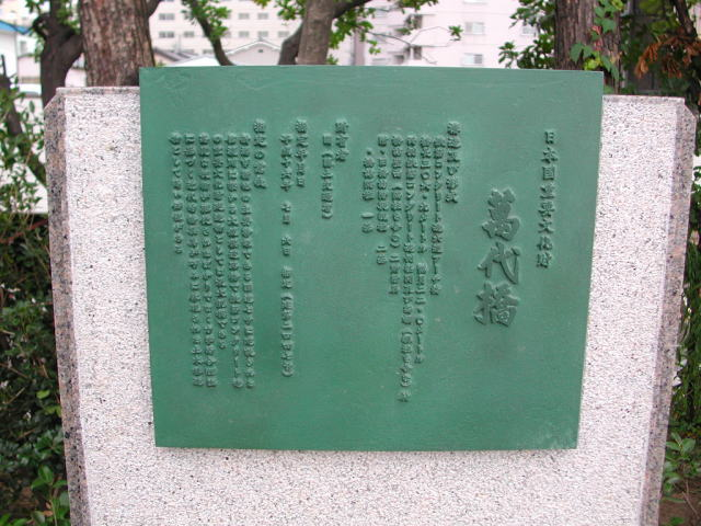 萬代橋（重要文化財碑）